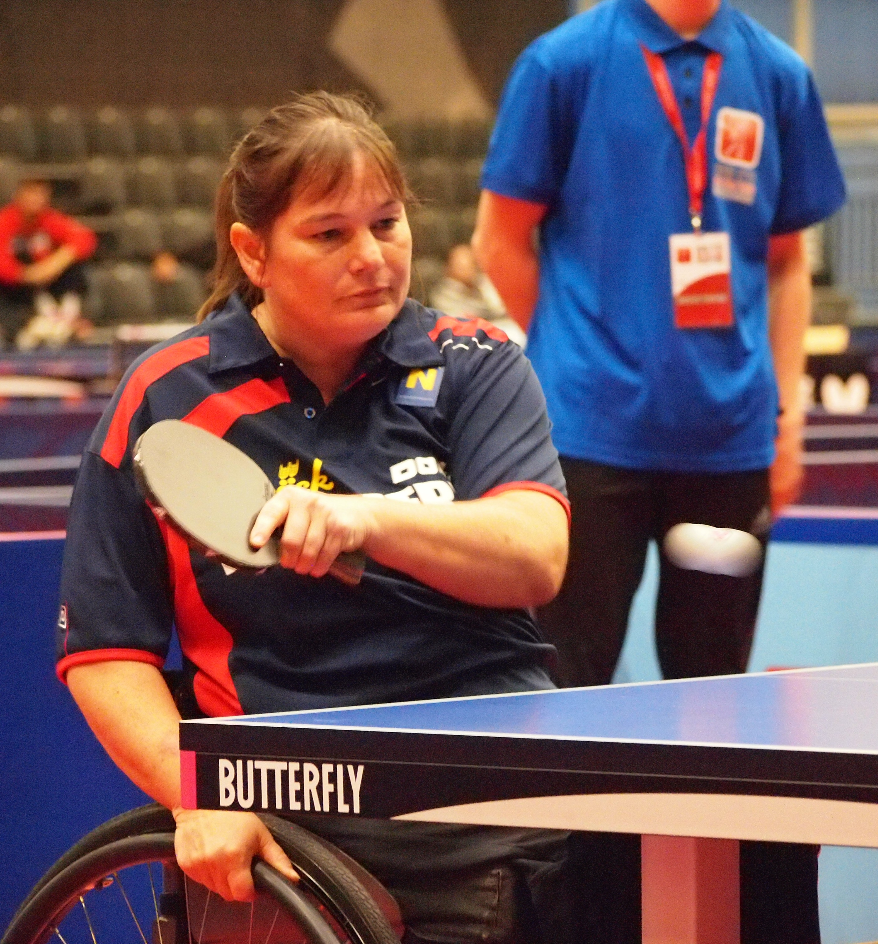 Doris Mader bei der EM 2015 in Vejle